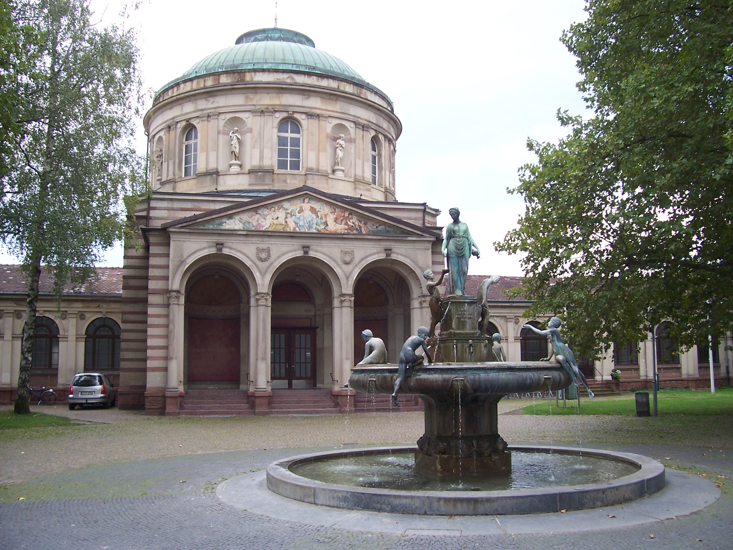 Hygieabrunnen (geschaffen 1905 bis 1909 von Johannes Hirt) vor dem Vierordtbad in Karlsruhe